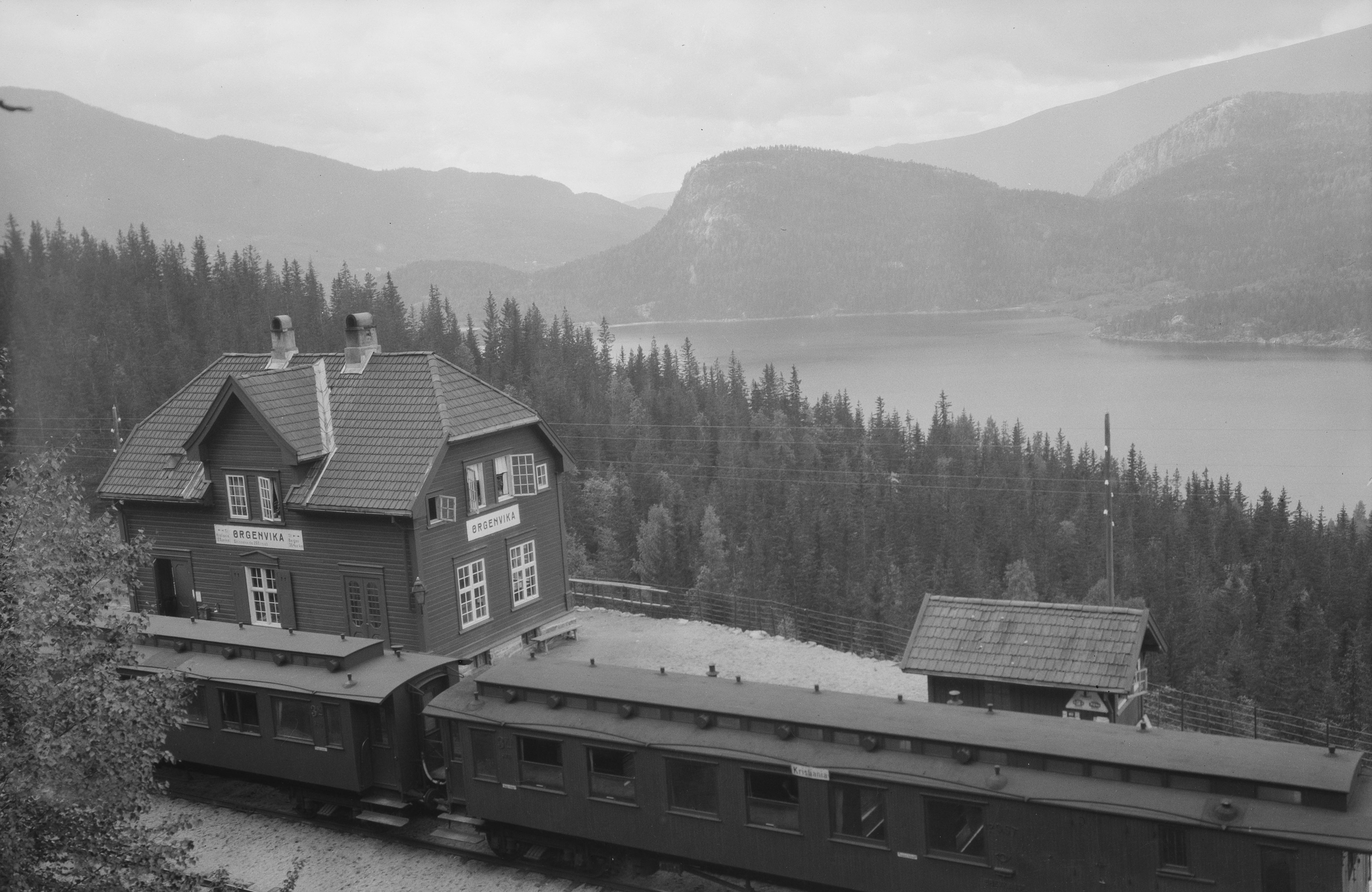 Ørgenvika stasjon. Mittet-bilde fra Nasjonalbibliotekets samling.